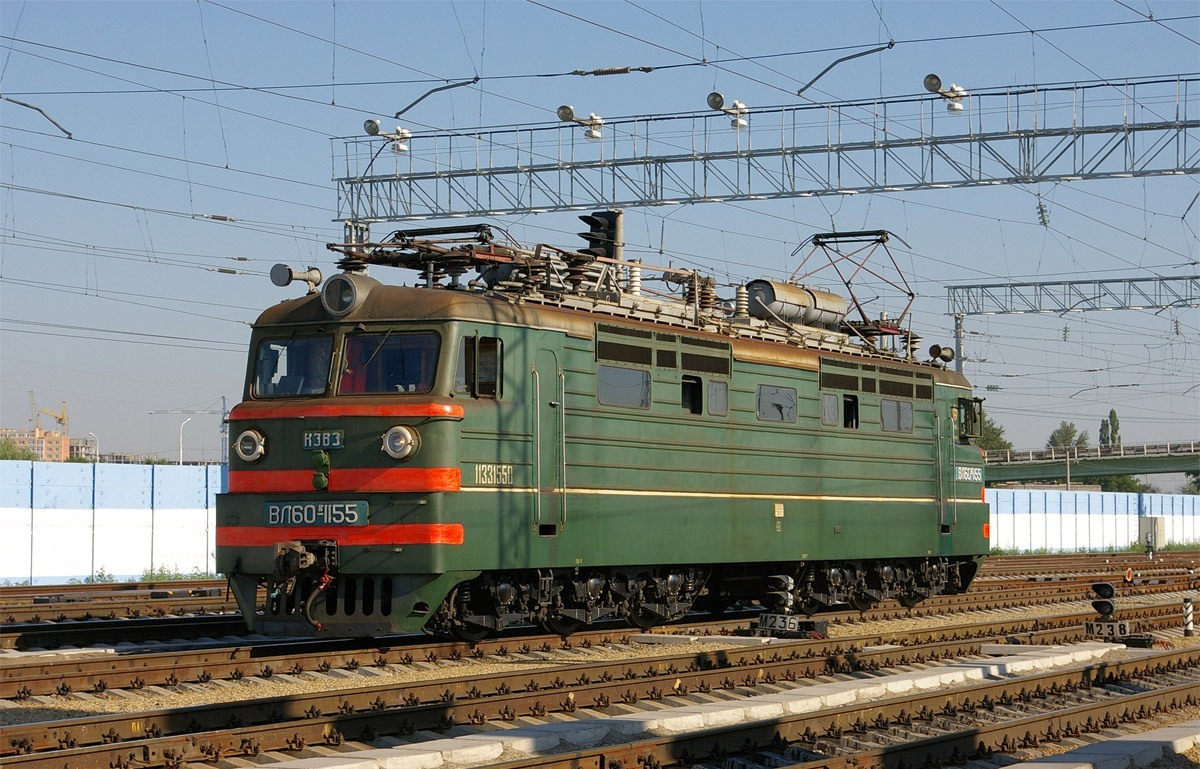 Электровоз ВЛ60К-1155 на станции Батайск